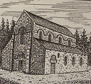 État ancien de la chapelle.